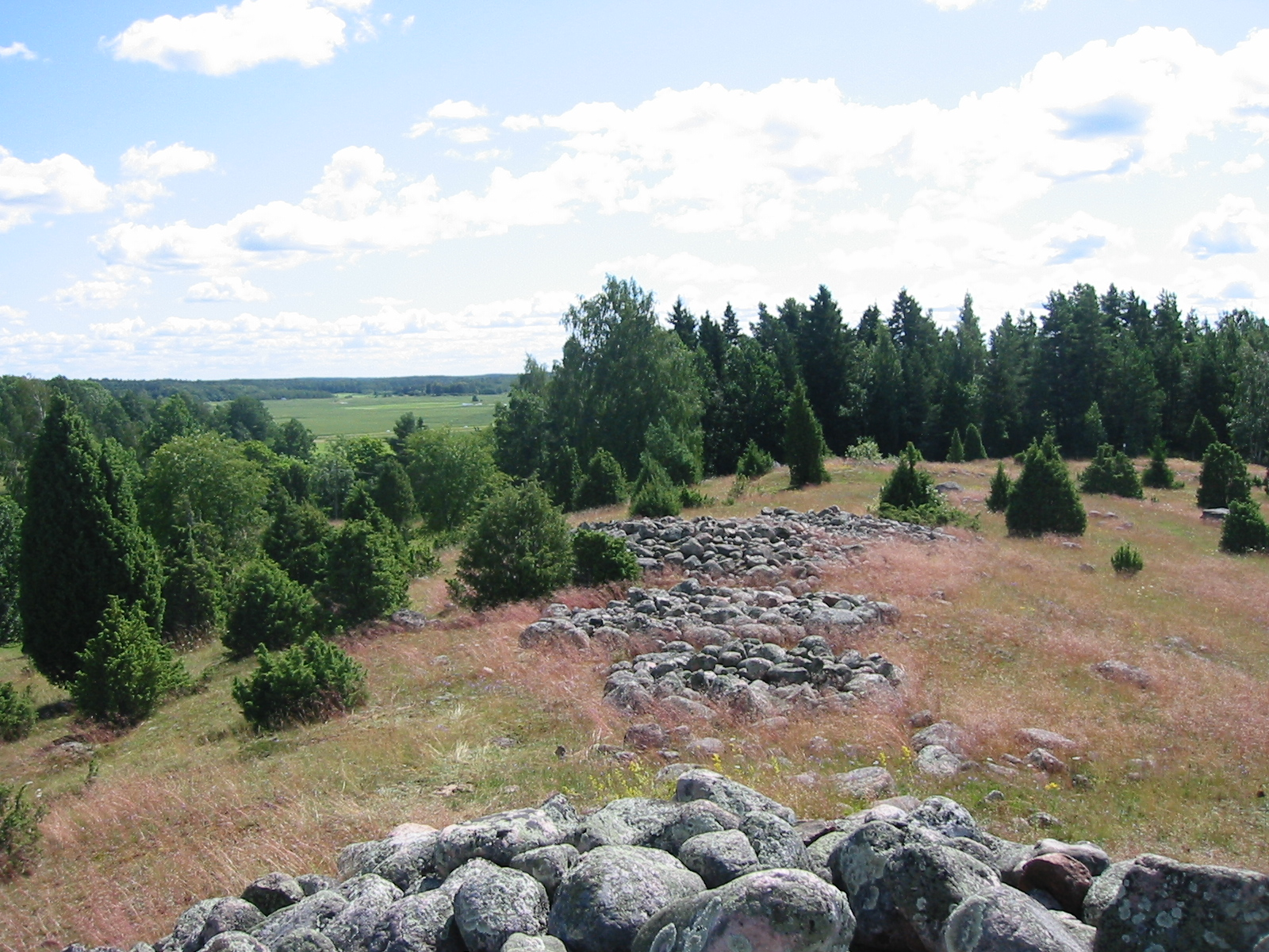 Gravrösen på Hornåsen, Västerås kommun.